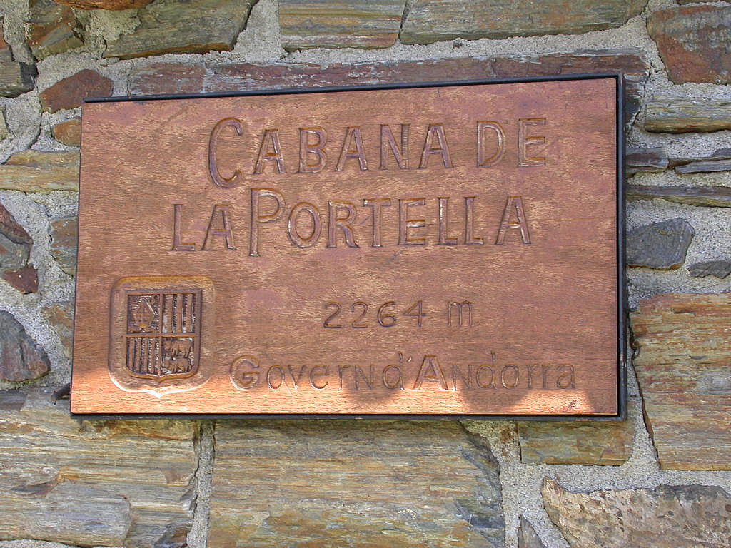 Refuges Andorre